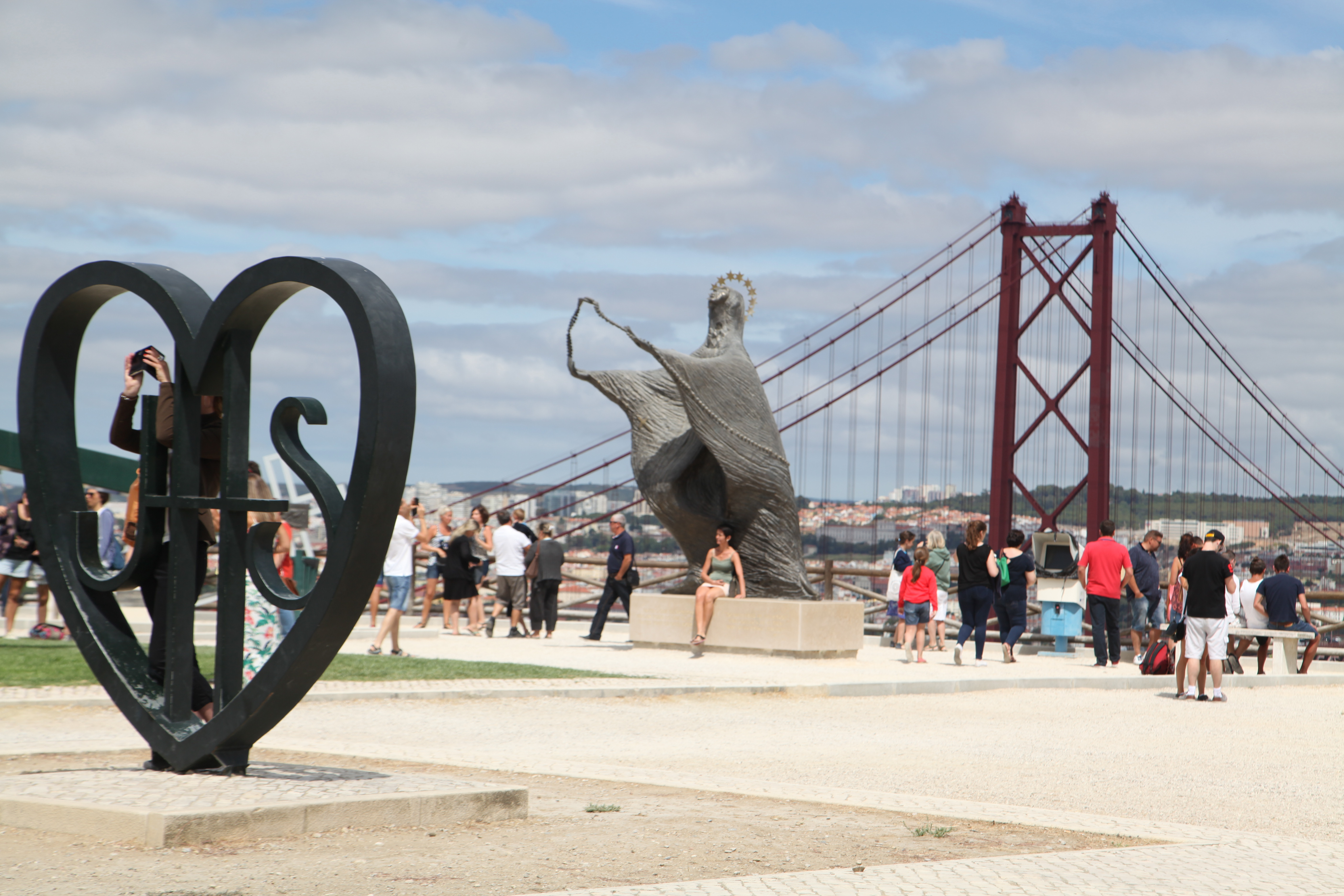 Lisbonne